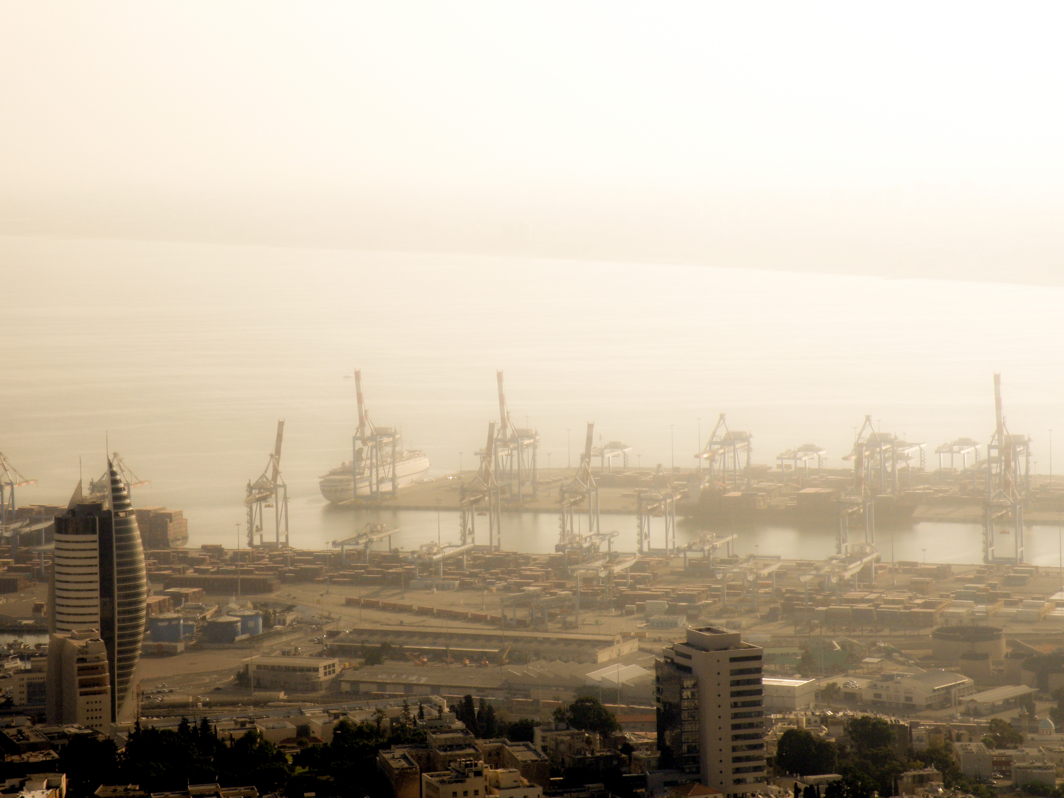 חיפה | Haifa Haifa